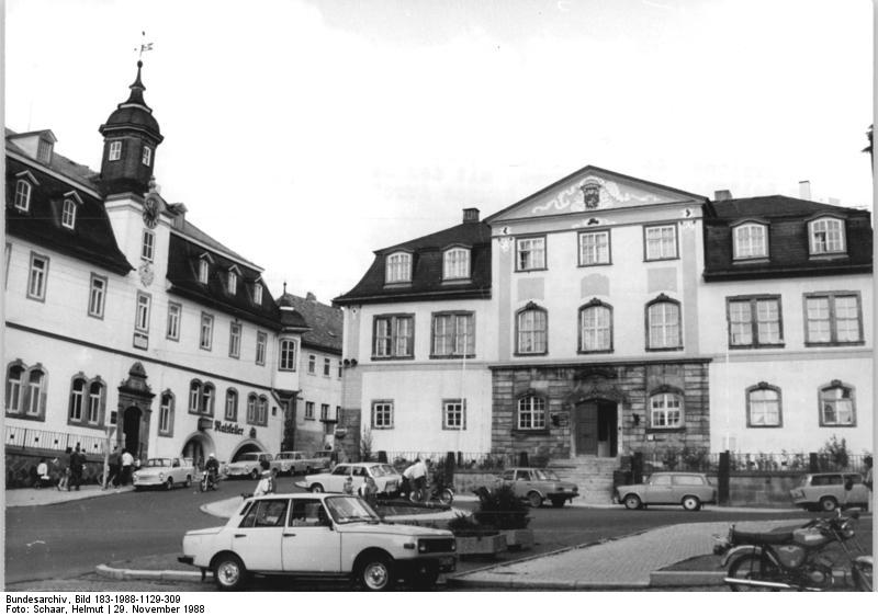 Ilmenau, Amtshaus Zum Beitrag: Ein Wanderweg mit dem Zeichen "G"-Auf Goethes Spuren durch den Thüringer Wald ADN-ZB Schaar-29.11.1988.bb Blick auf das Amtshaus in Ilmenau, in dem heute Das Kreisgericht seinen Sitz hat. An der Rückseite des Gebäudes führt ein Treppenturm zu der im ersten Obergeschoß gelegenen Gedenkstätte der klassischen deutschen Literatur mit dem "Goethezimmer". Der Weimarer Geheimrat Goethe weilte oft in amtlichen Geschäften in Ilmenau, und hier enstanden u.a. auch einige bekannte Gedichte Johann Wolfgang Goethes. (Hierzu gehören die Fotos 1988-1129-309N und 310N!) Information added by Wikimedia users.Zu sehen sind das Rathaus links und das Amtshaus rechts am Marktplatz. Das Amtsgericht hat seinen Sitz heute nicht mehr im Amtshaus, sondern in der ehemaligen Glasfachschule am Wallgraben. Die Goethe-Gedenkstätte wurde zum Stadtmuseum erweitert und ist seit dem Umbau 2008 über den Haupteingang zu erreichen. (Michael Sander)